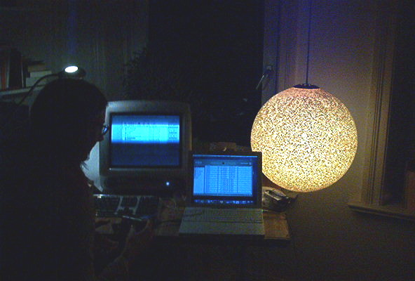 Stines Kugel